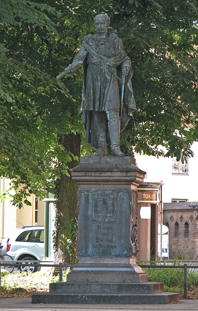 Beschreibung: Blücher-Denkmal in Rostock / Gebhard Leberecht von Blücher / Germany Fotograf: Darkone, 17. August 2005 Other versions